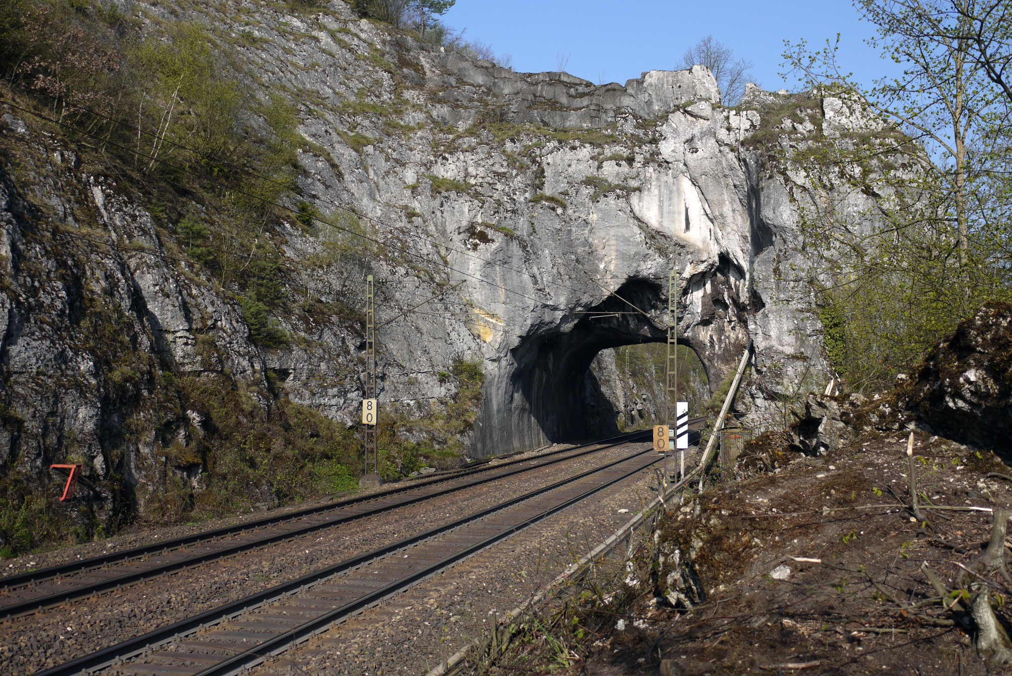 Das Felstor an der Bahnstrecke Regensburg–Nürnberg, mit 16 Metern der kürzeste Eisenbahntunnel in Deutschland, gut einen Monat vor seiner Sprengung.